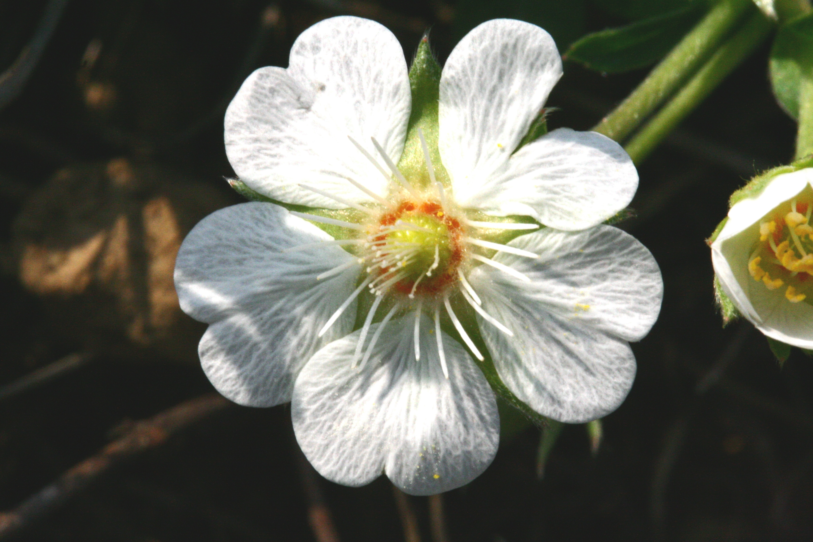 Potentilla_alba (Cinquefoglia bianca) Corlonch, Trichiana (BL), quota 580 m s.l.m.